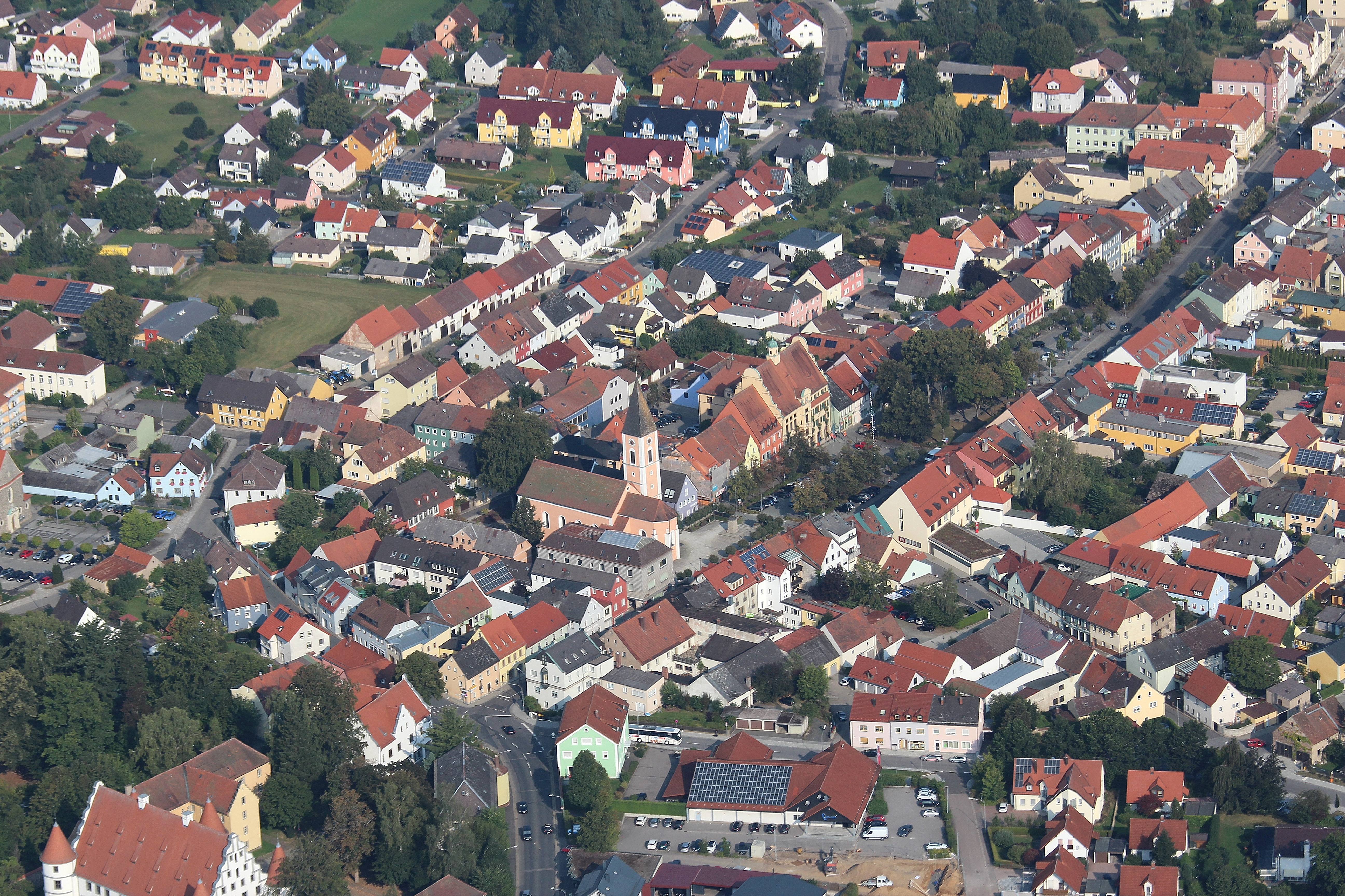 Stadtkern Vohenstrauß, Landkreis Neustadt an der Waldnaab, Oberpfalz, Bayern